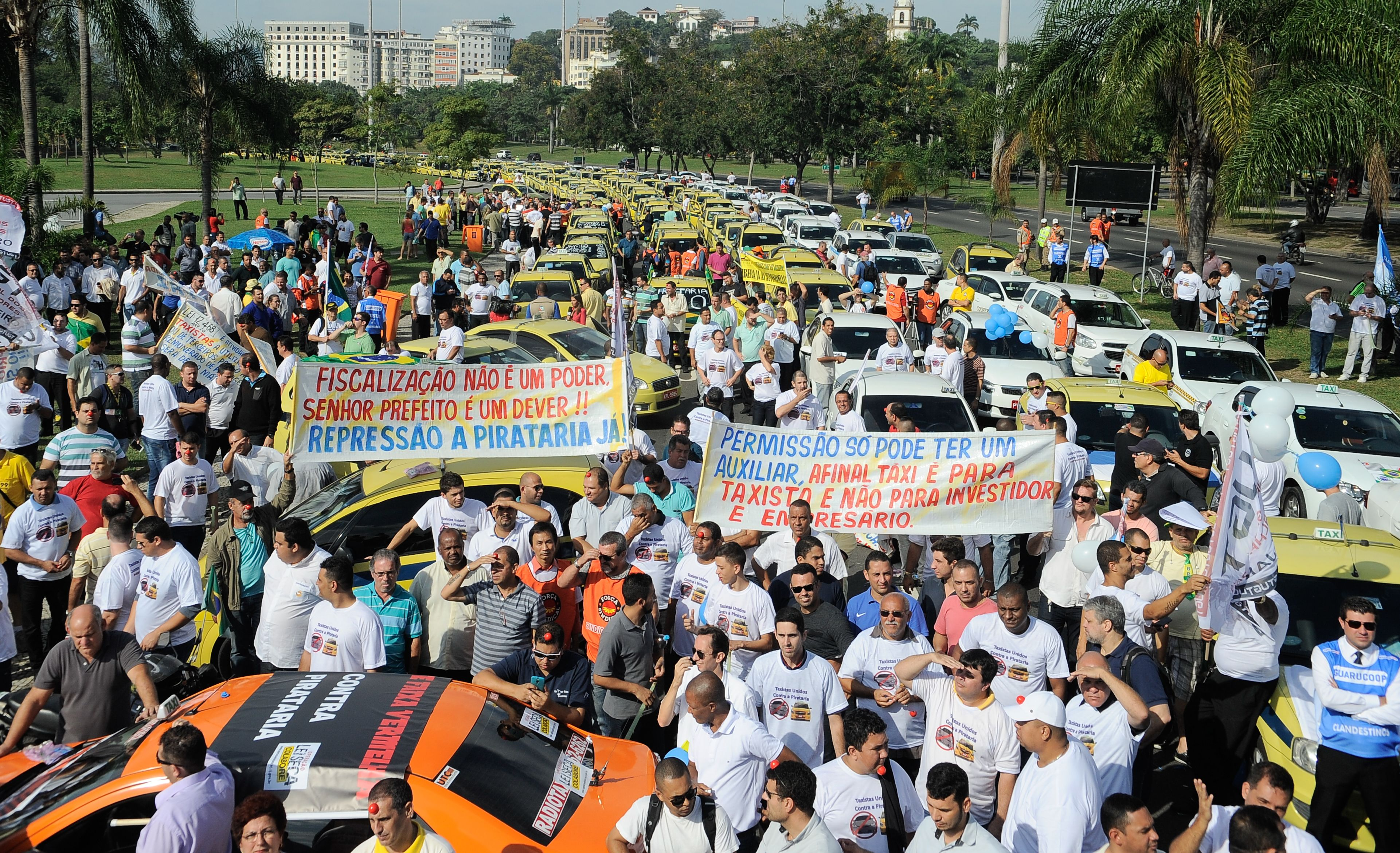 Os taxistas do município do Rio de Janeiro fazem uma grande manifestação contra o aplicativo de carona remunerada Uber em frente ao Monumento aos Pracinhas, no Parque do Flamengo.